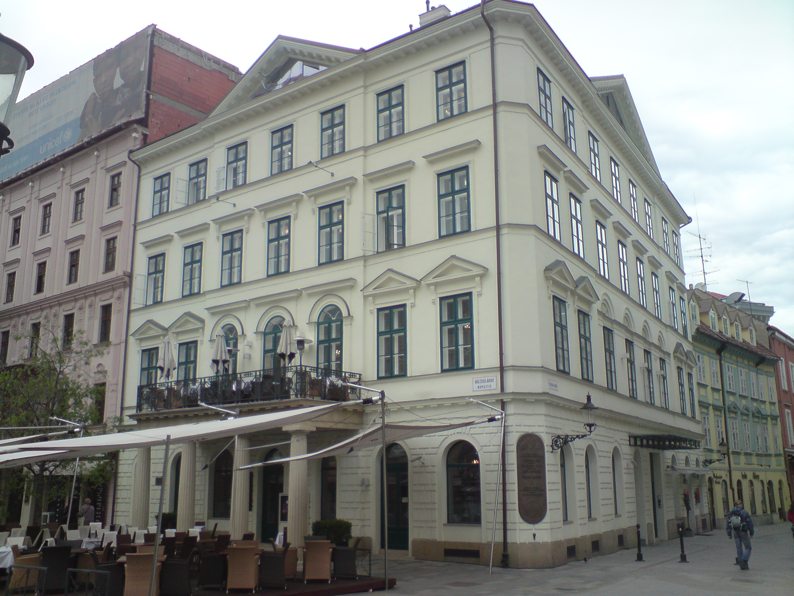 Kernov dom, Sedlárska, Hviezdoslavovo námestie, Bratislava